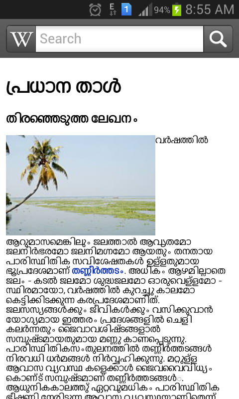 വിക്കിപീഡിയ മൊബൈൽ ആപിൽ (പതിപ്പ്: 1.3.4) മലയാളം വിക്കിപീഡിയ.